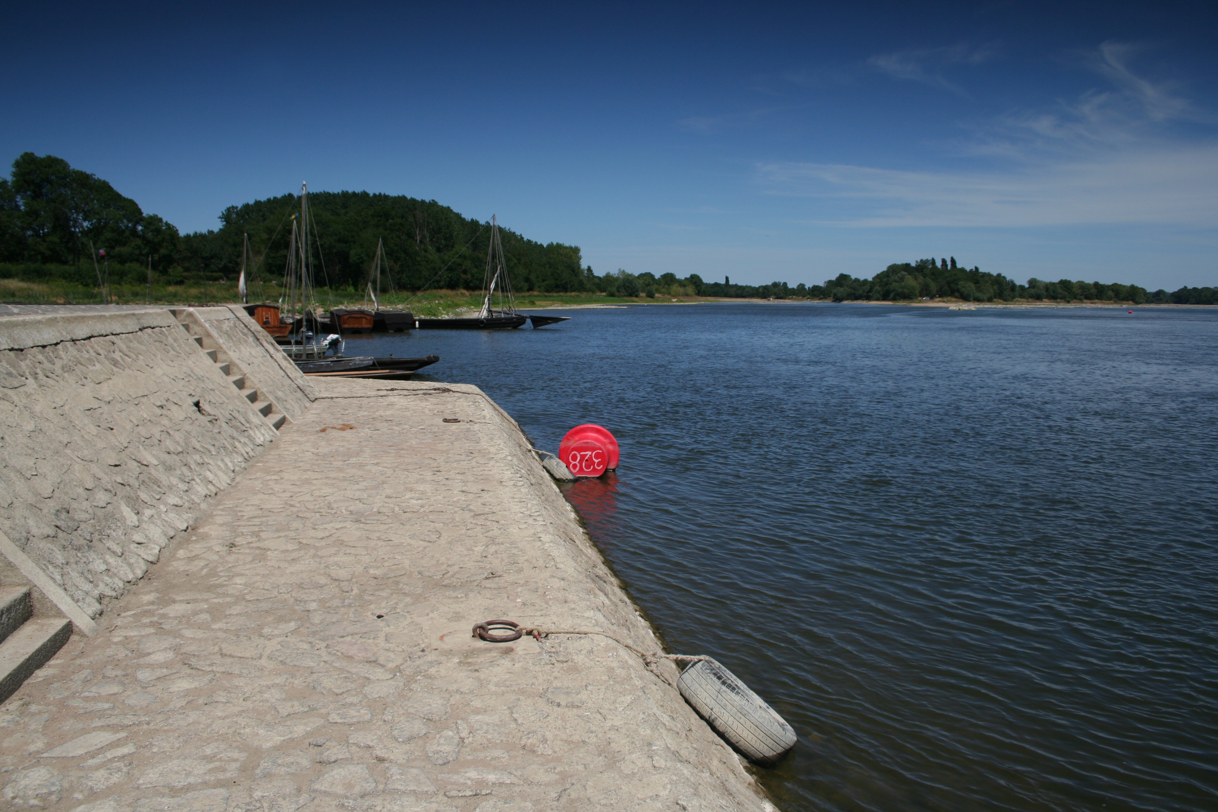 Le port de la Possonnière